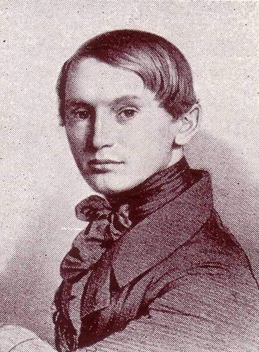 Friedrich von Behr als Bonner Preuße